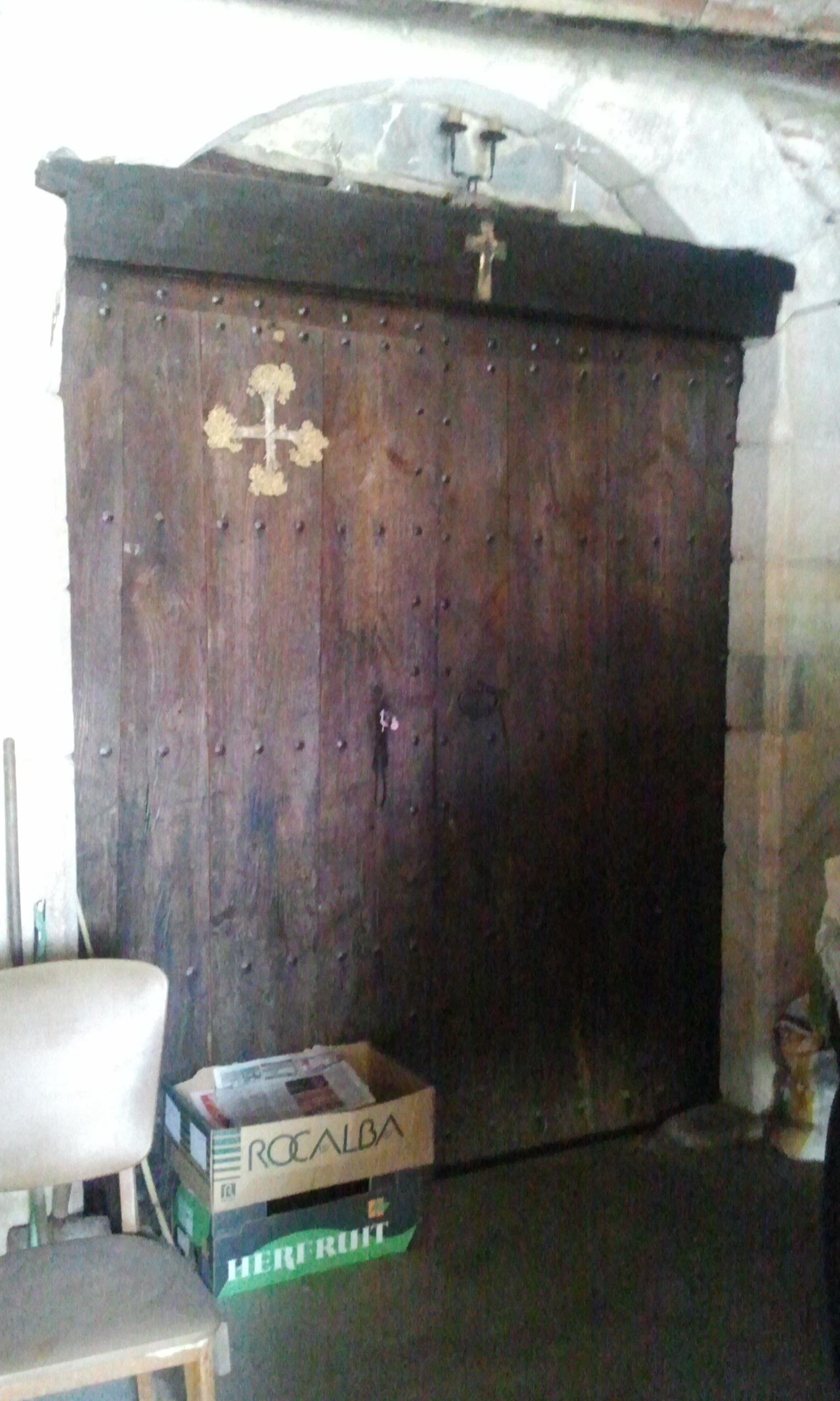 Porte de la chapelle Saint-Sébastien du quartier d'El Palau à Ceret, Pyrénées-Orientales, France.